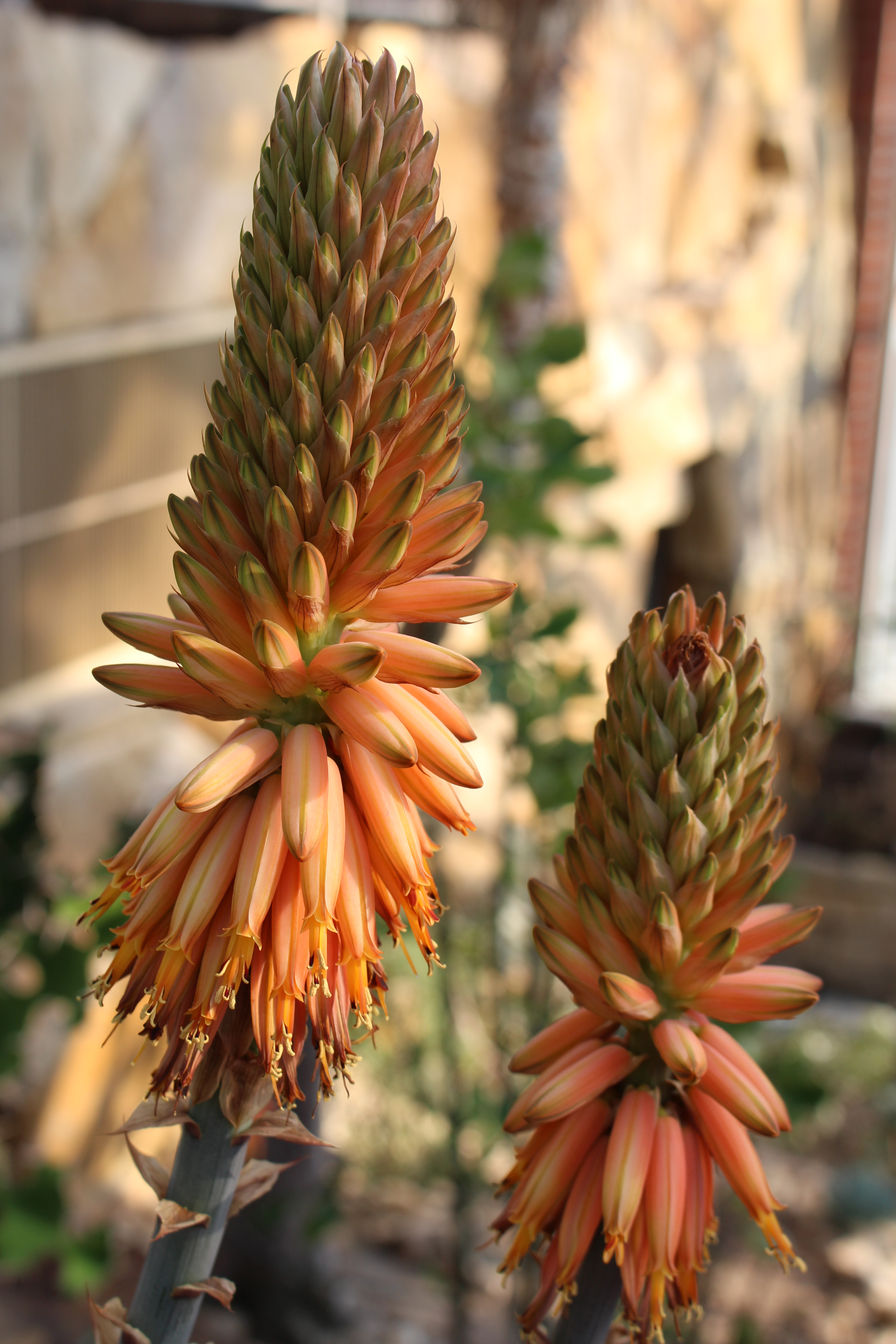 Inflorescence of Aloe rubroviolacea in the Berlin Botanical Gardens, Germany